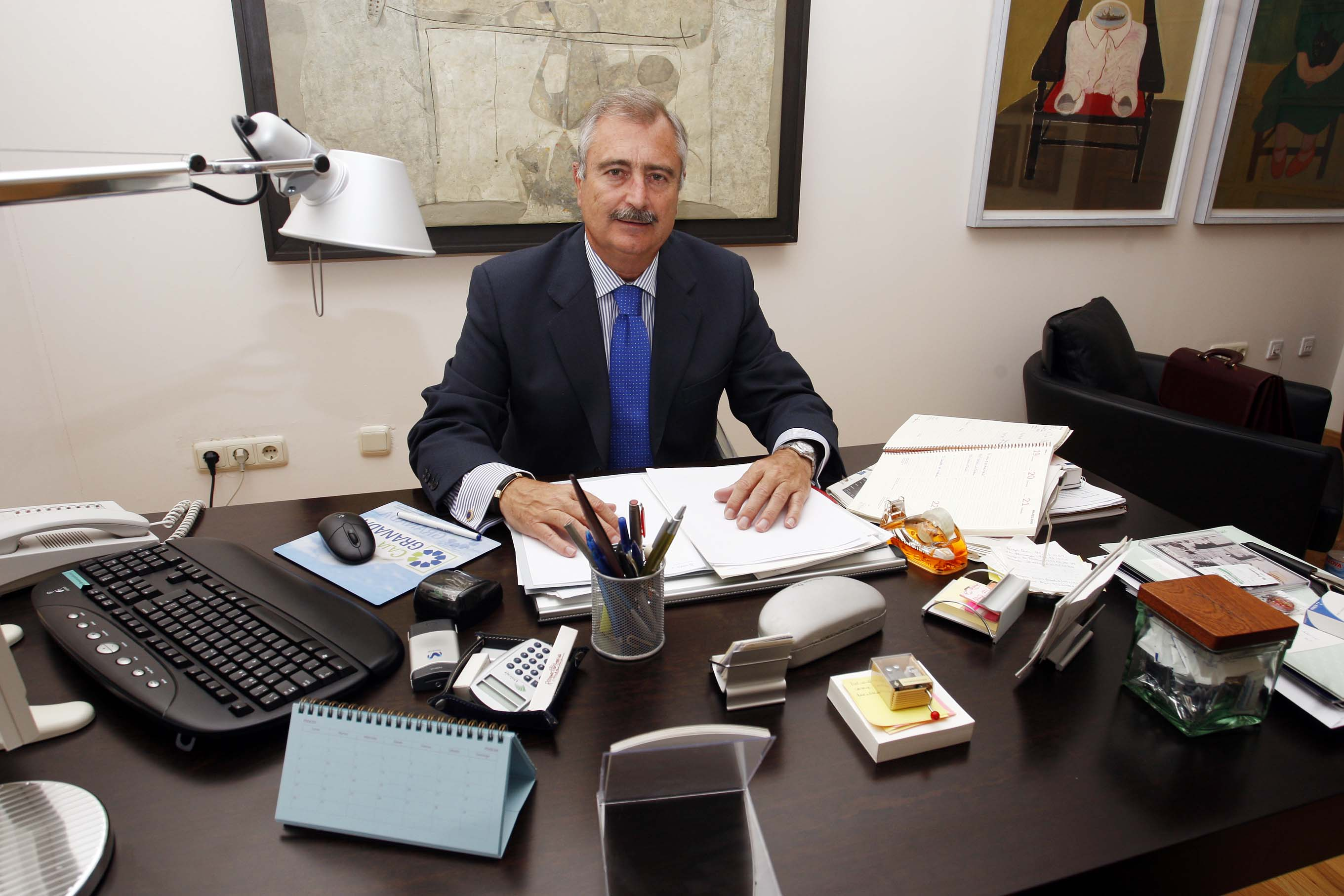 José María Martín Delgado. Despacho